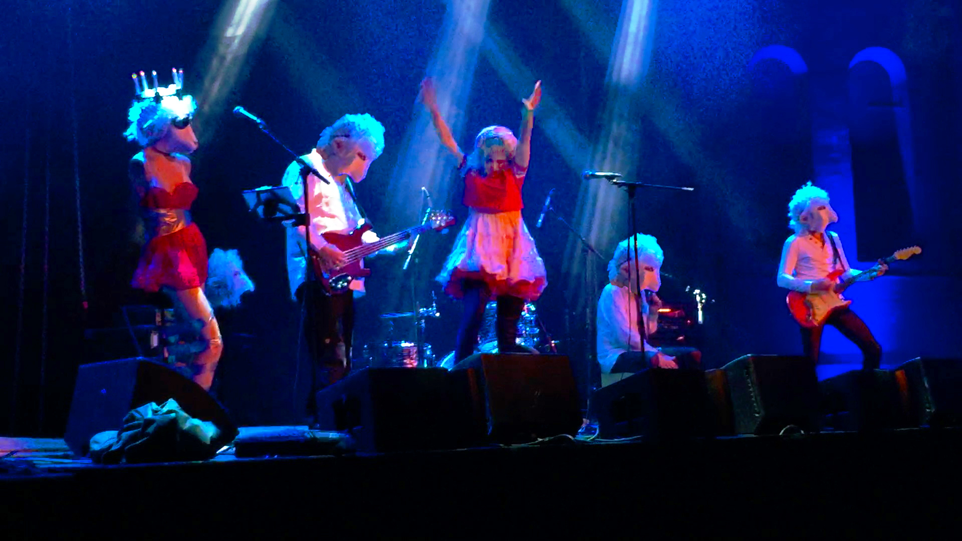 Fotografi av Solblomma Hedin med band under hennes konsert i Gävle gasklocka.